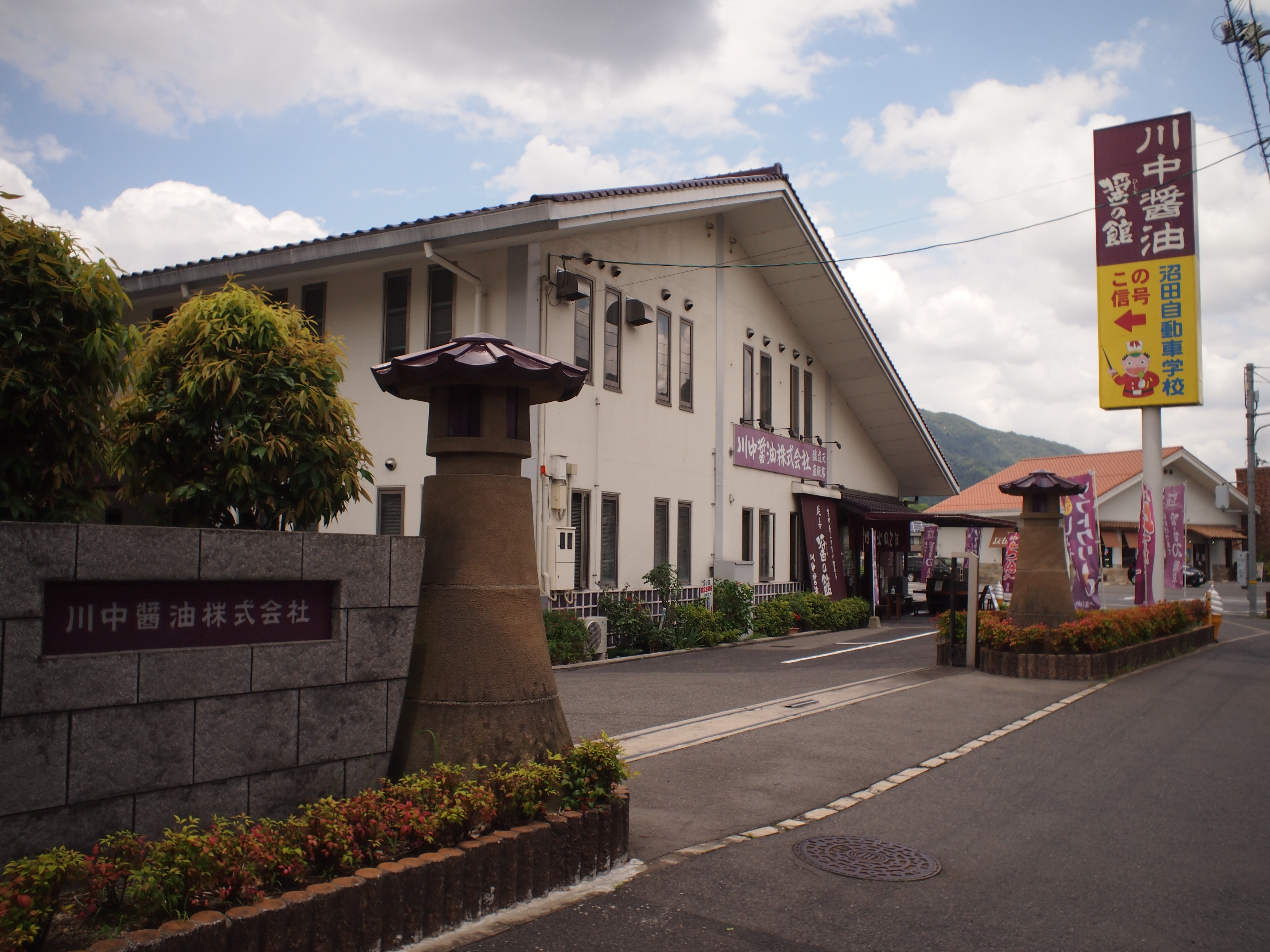 川中醤油本社